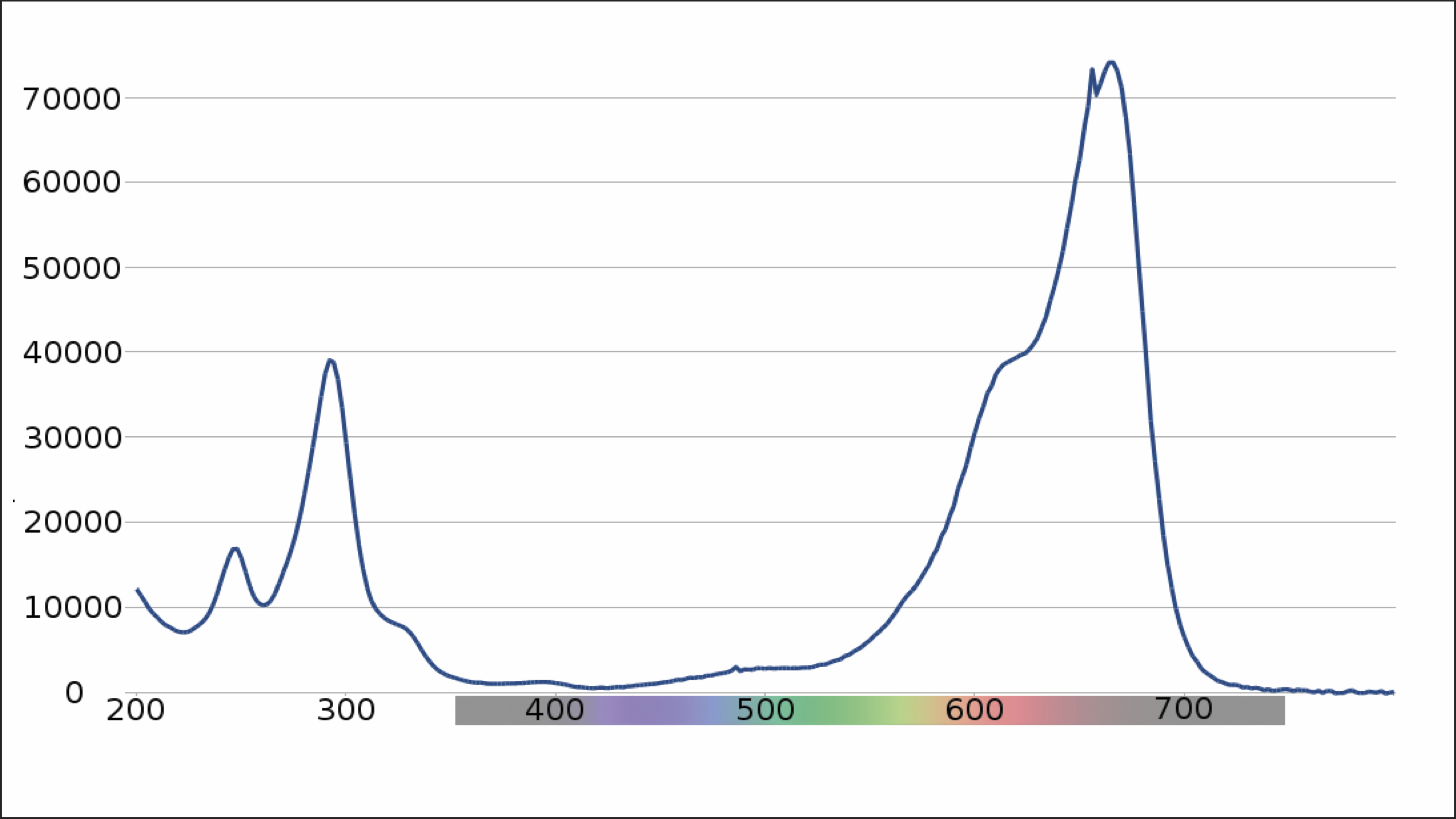 Methylene blue absorption spectrum